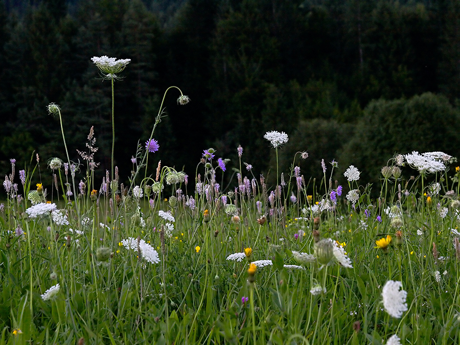 Bergwiese